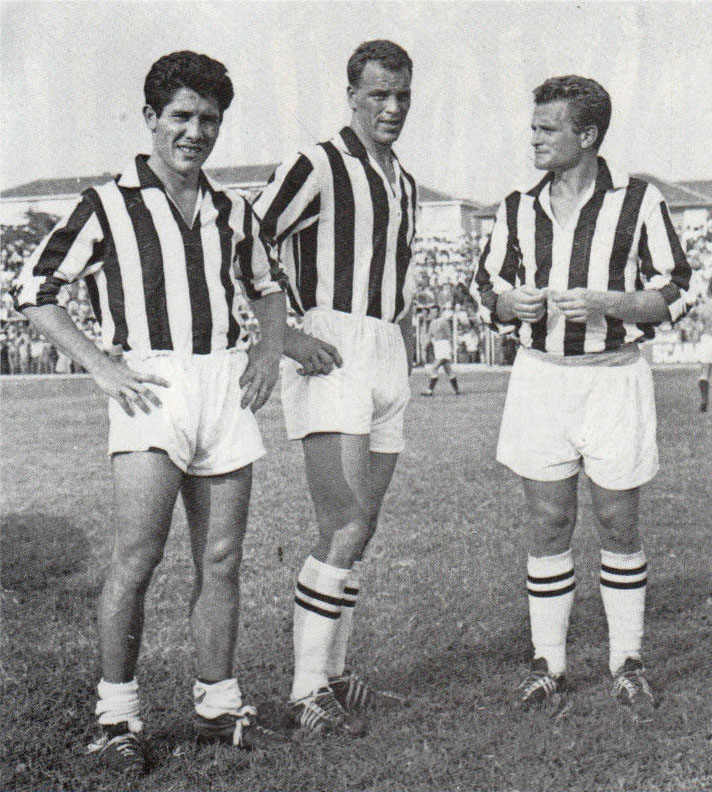 Il "Trio Magico" d'attacco della Juventus — da sinistra: l'italo-argentino Omar Sívori, il gallese John Charles e l'italiano Giampiero Boniperti — all'inizio della stagione 1957-58.